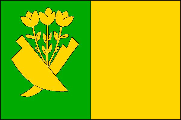 Vlajka obce Zátor